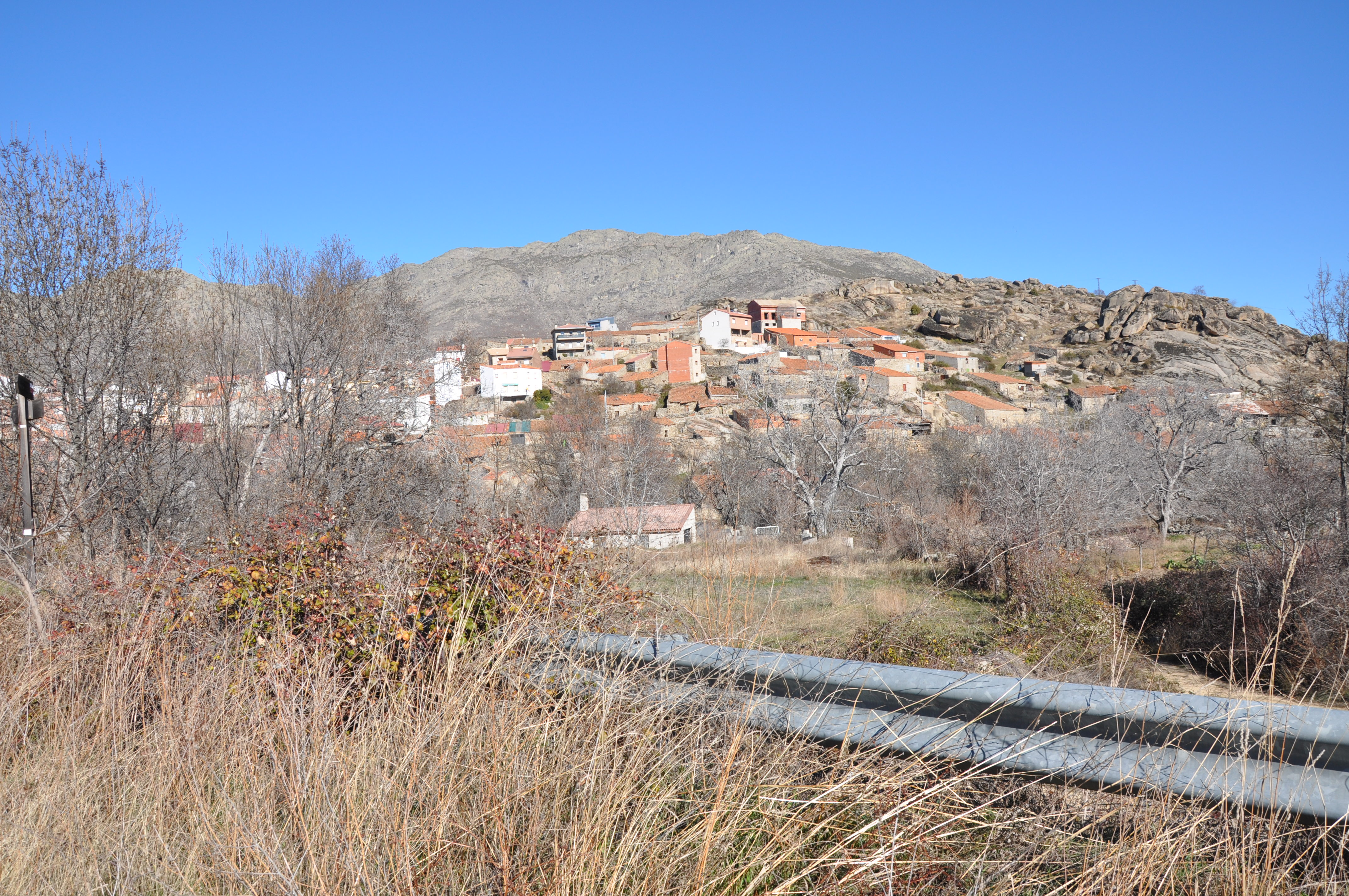 Panorama de Navarredondilla, Ávila, España